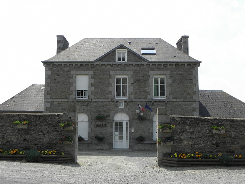 Mairie de Courtils (50).